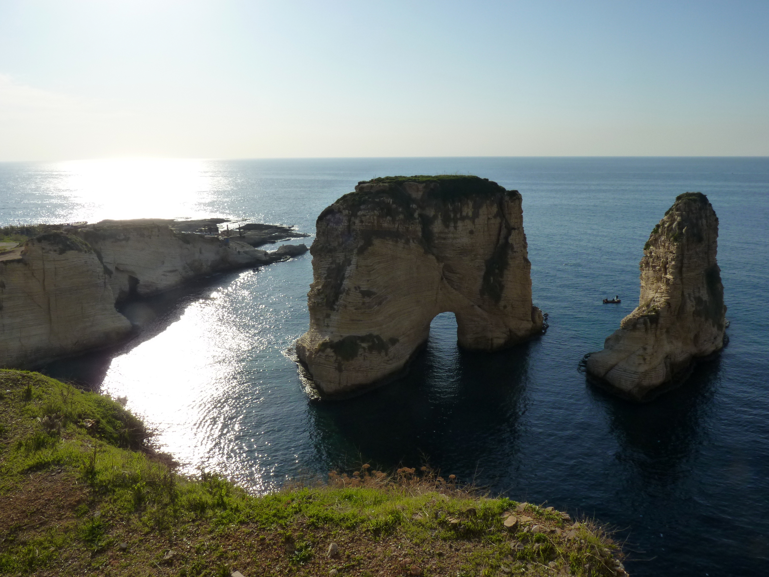 December 2011